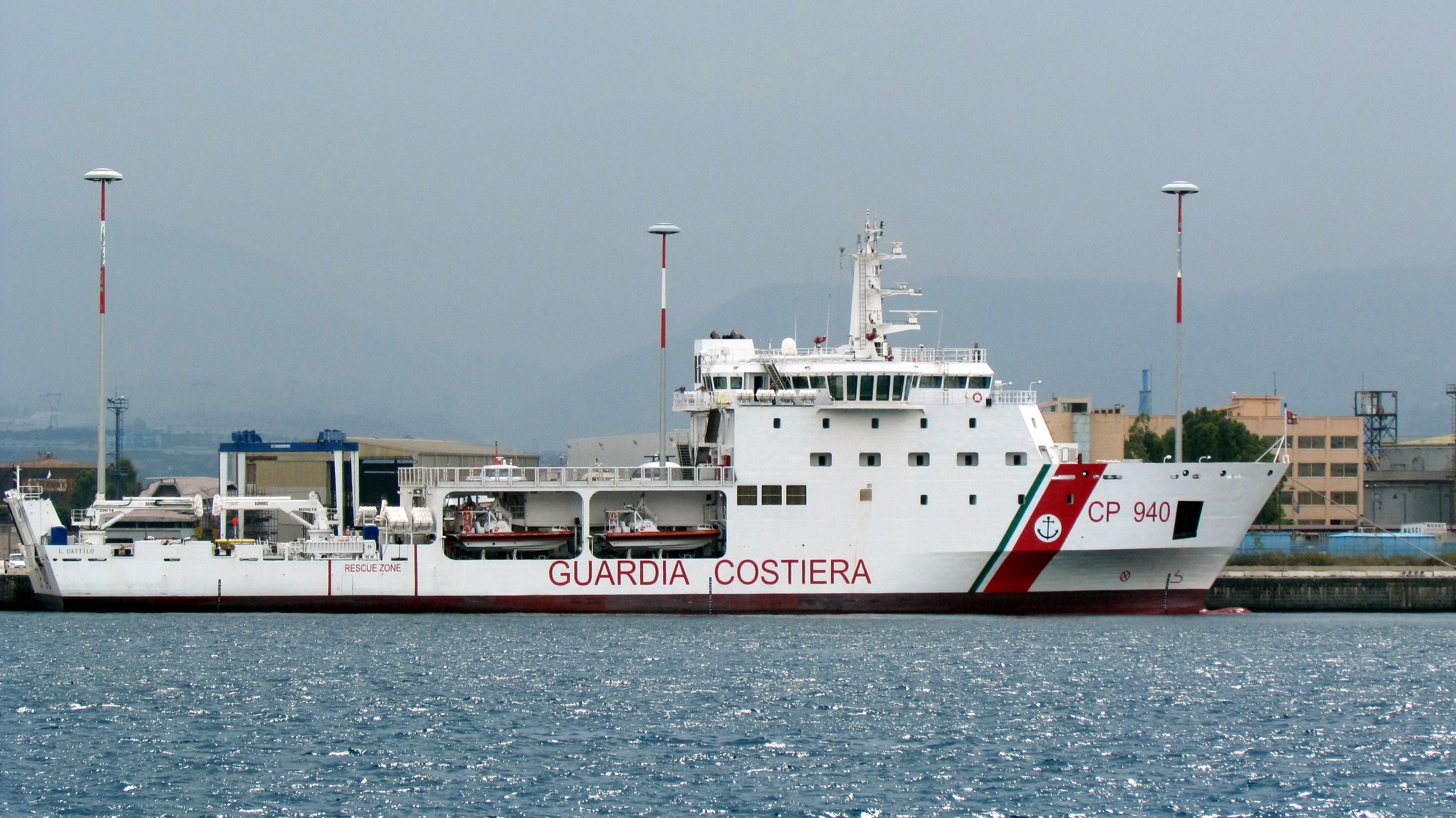 Il pattugliatore della Guardia Costiera Dattilo ormeggiato a Messina